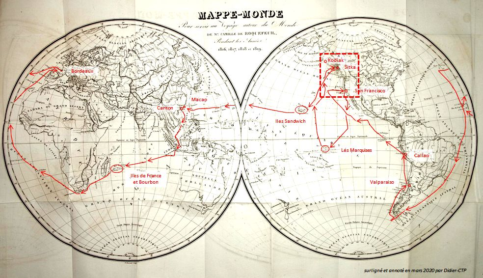 figure extraite du Journal d'un voyage autour du monde, per Camille de Roquefeuil, 1823